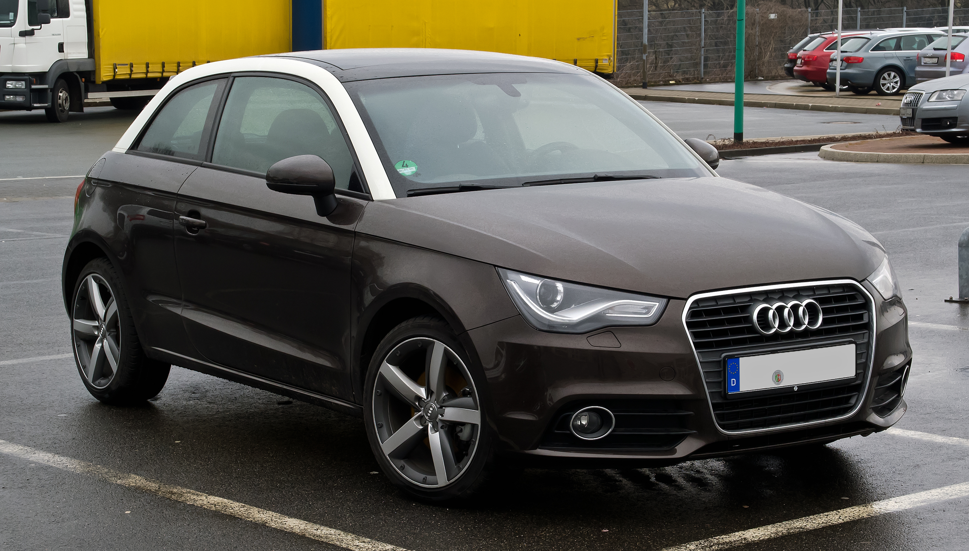 Audi A1 1.4 TFSI Ambition